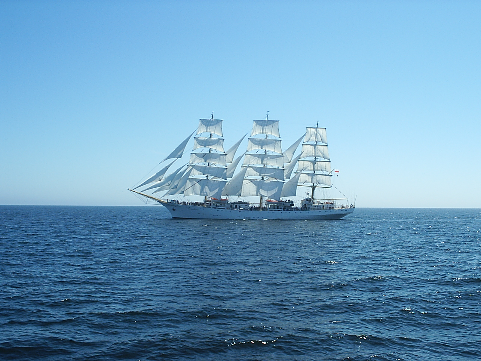 Dar młodzieży